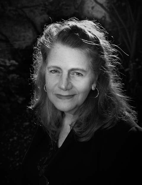 Portretfoto van Ria Verhaeghe